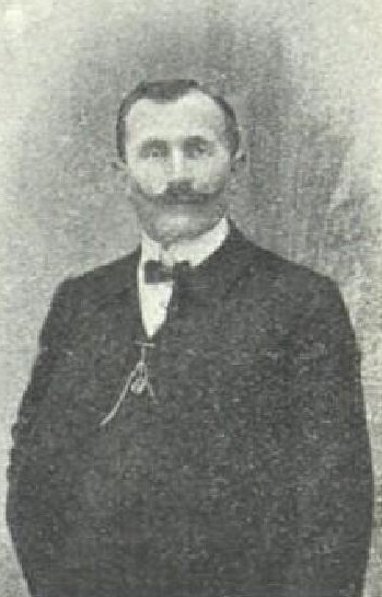 Václav Douša (1872-1943), rakouský a český politik